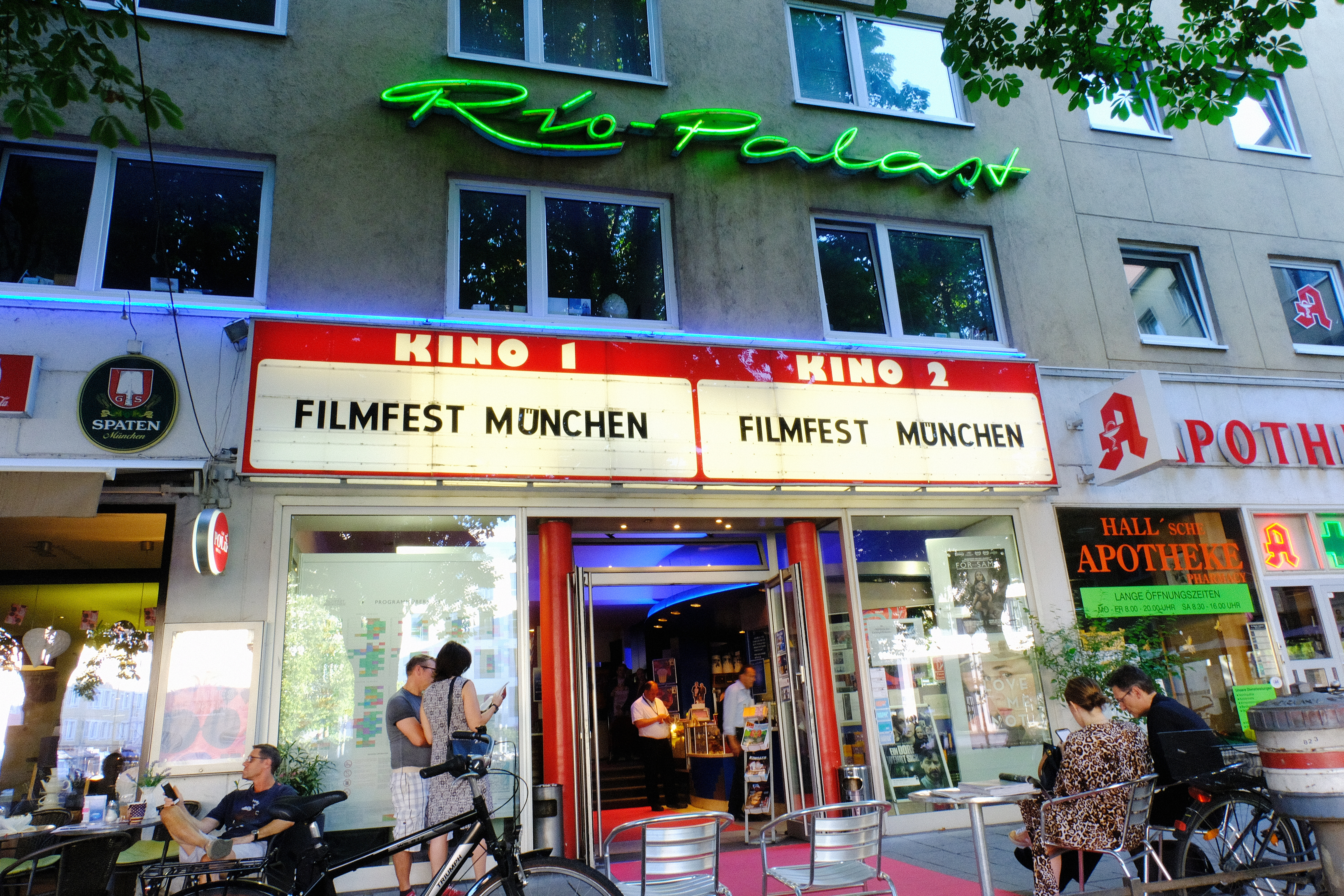 Das Kino „Rio-Palast“ während des Filmfest München (2019)